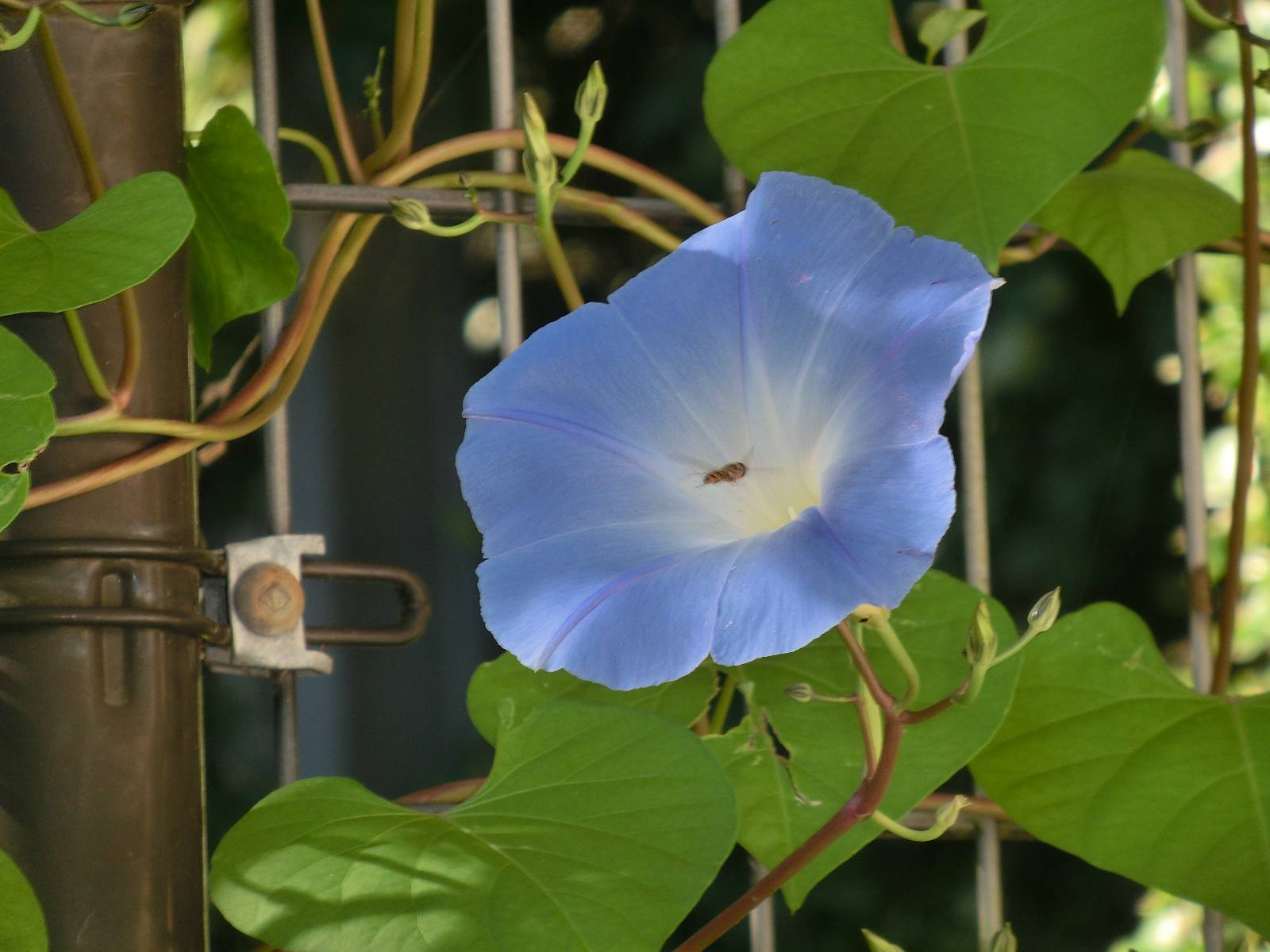 11月に咲いたヘヴンリーブルーを訪れたミツバチ